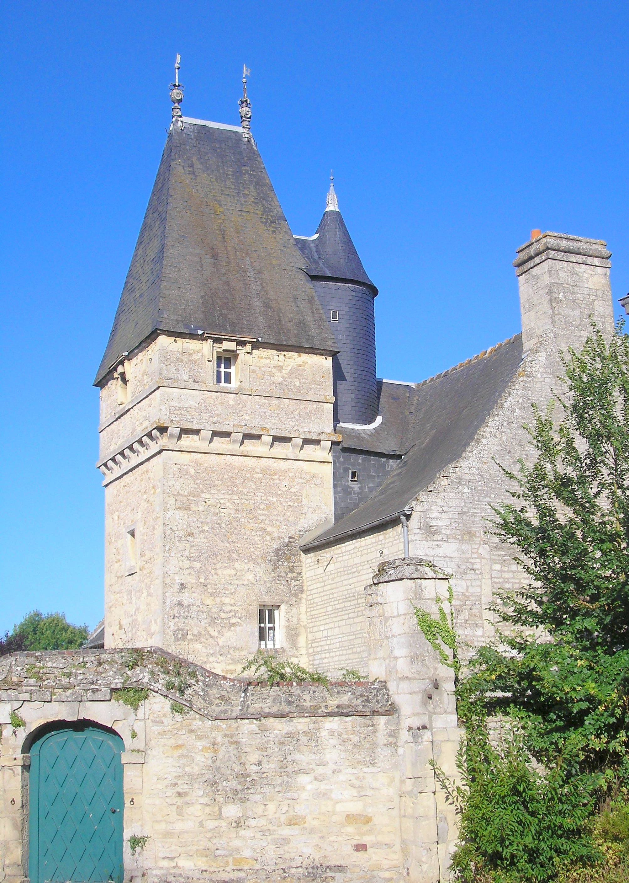 Verson (Normandie, France). Le manoir de la Fontaine.